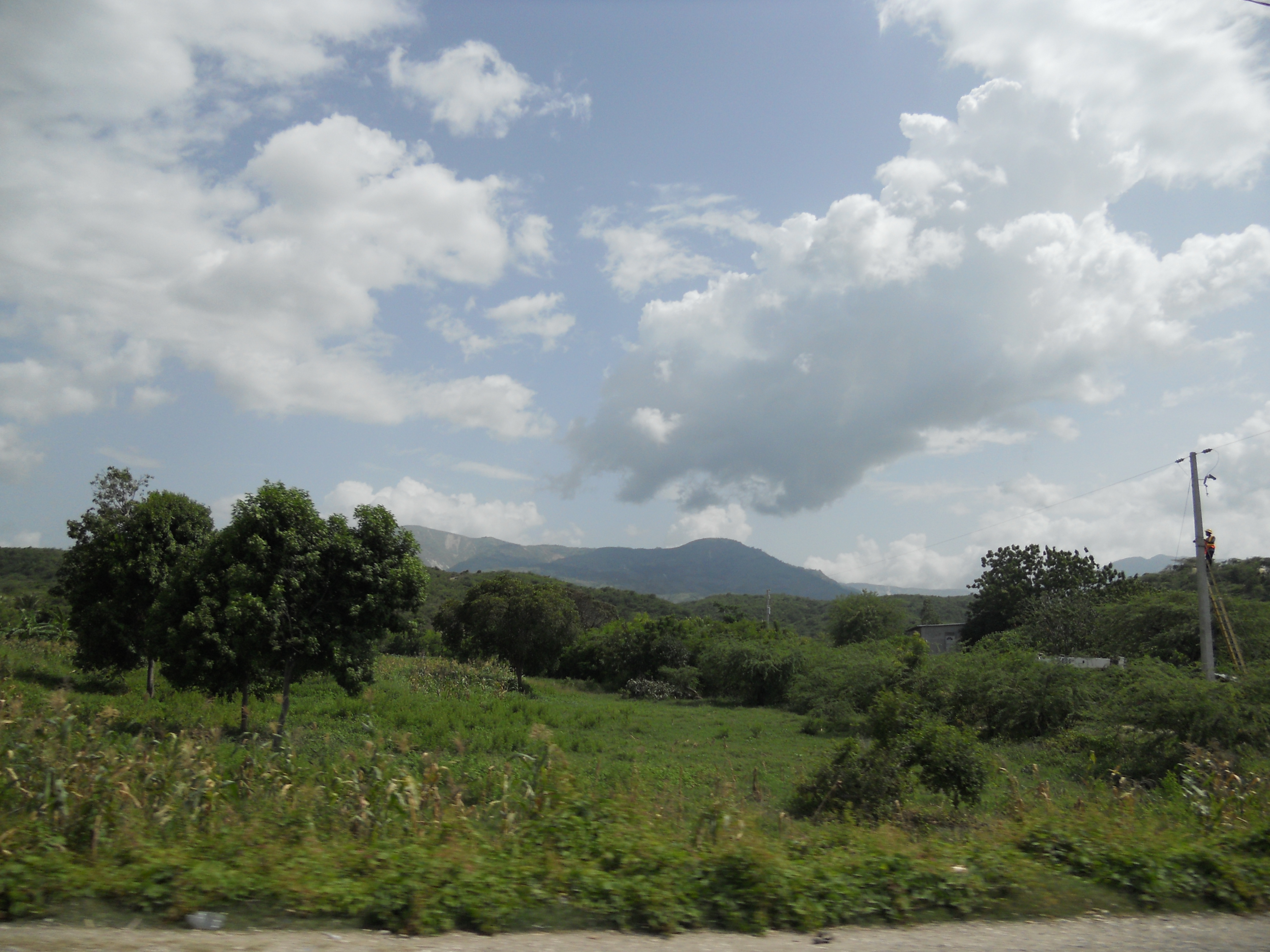 Route National #2, entre Leogane et Grand Goave